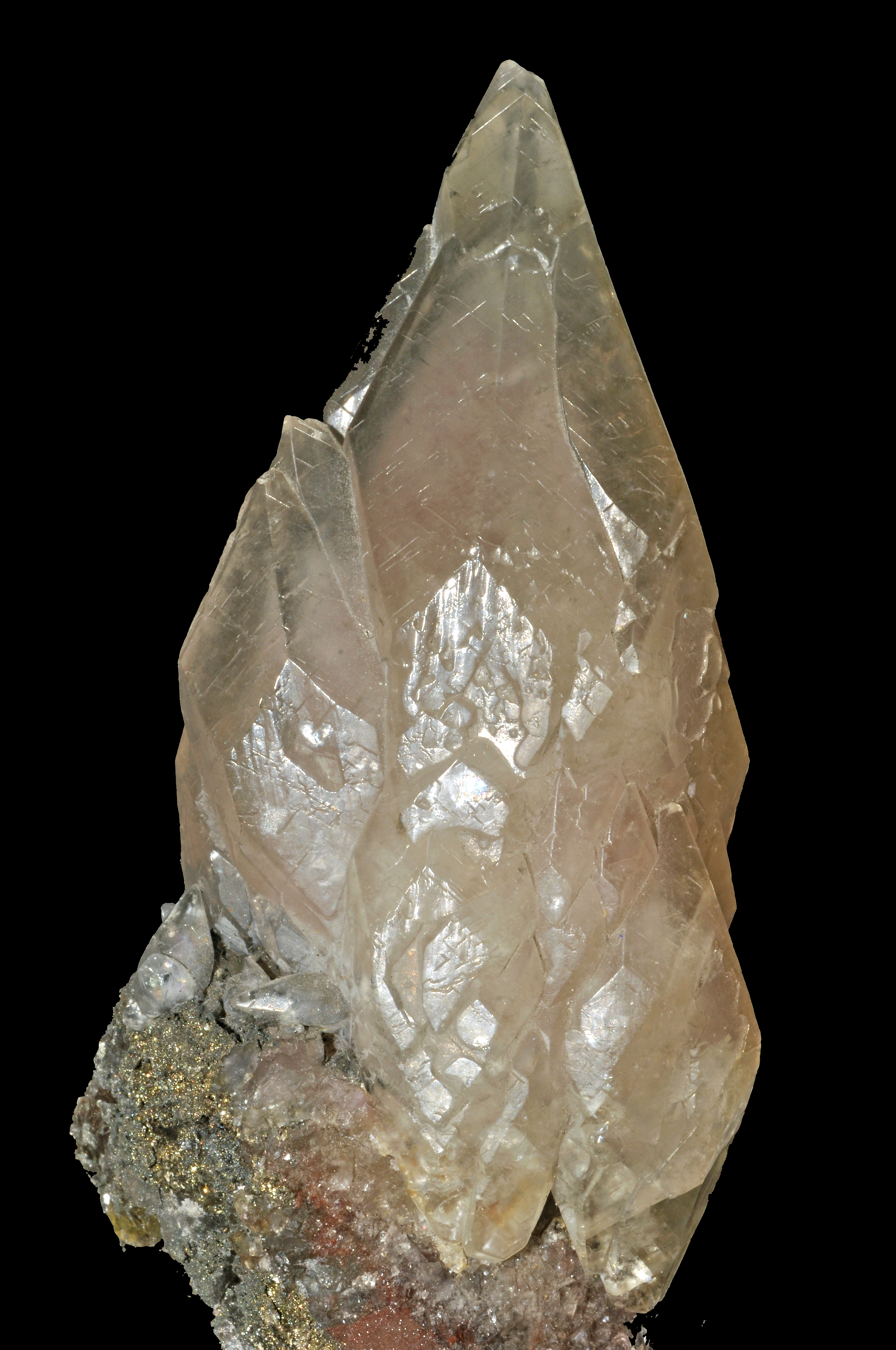 cristal de calcite sur gangue